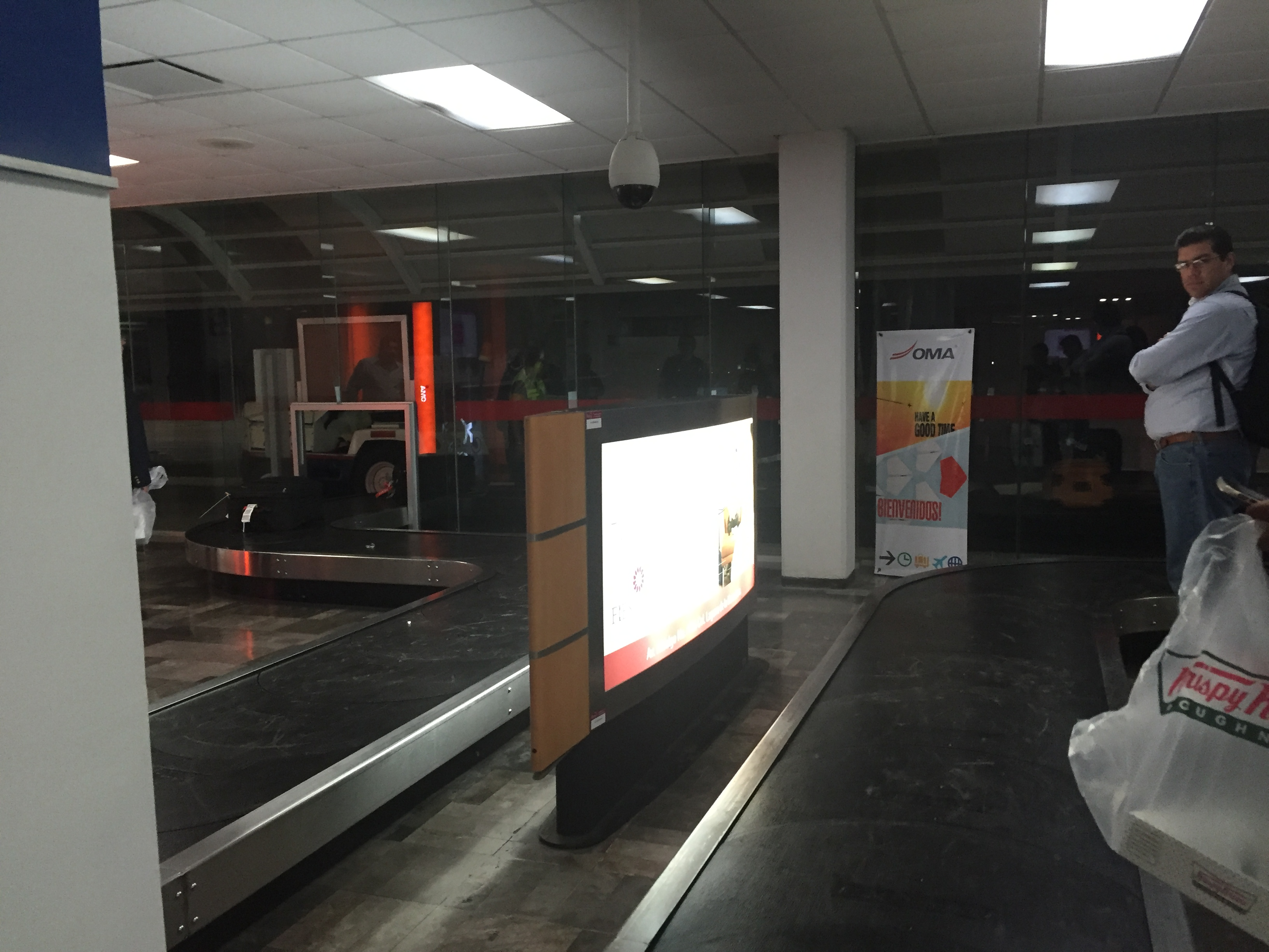 Banda de equipaje nacional del Aeropuerto Internacional de Tampico.